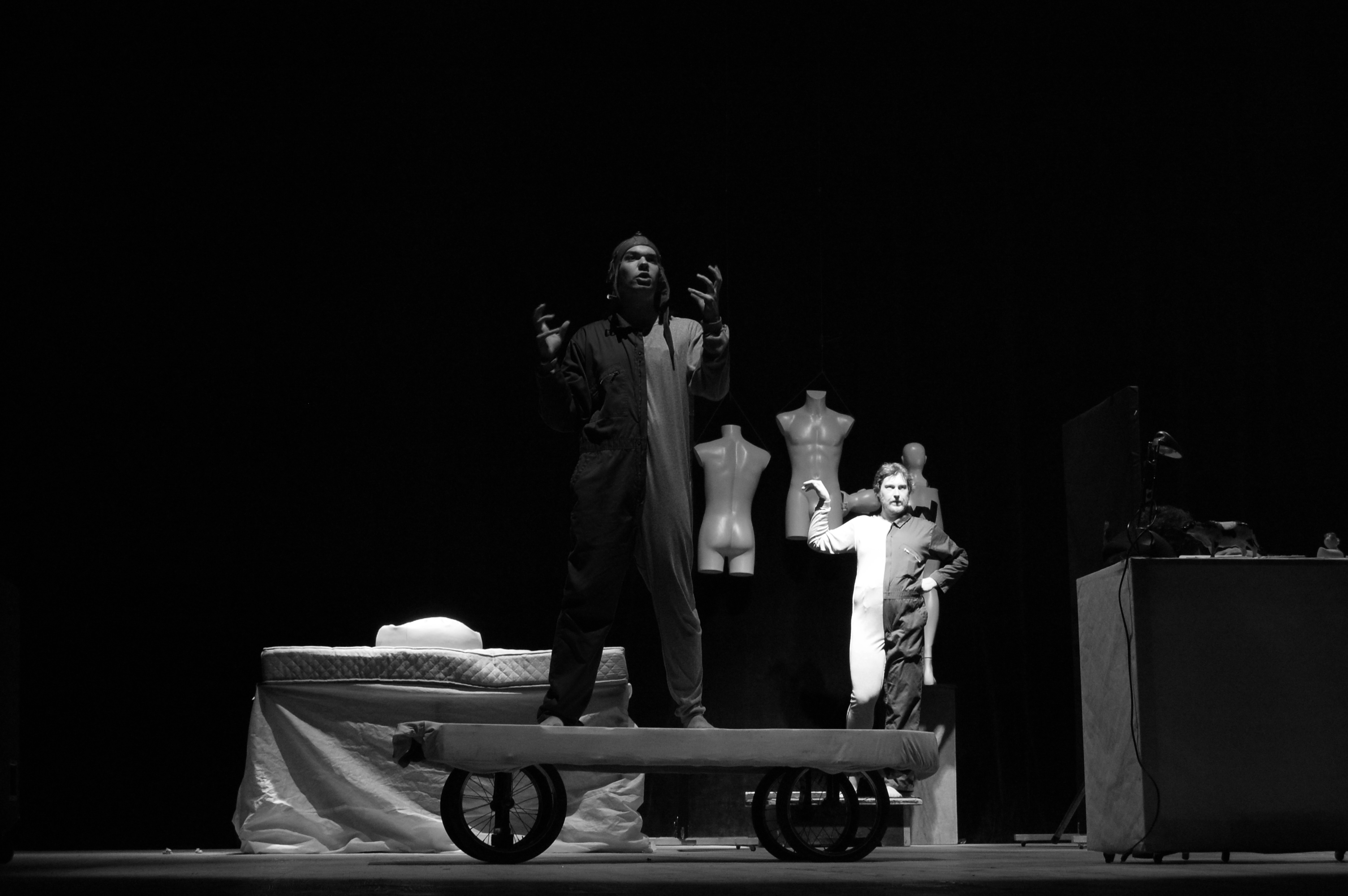 Teatr Napięcie, Lewa Strona Prawa Strona, Lublin.